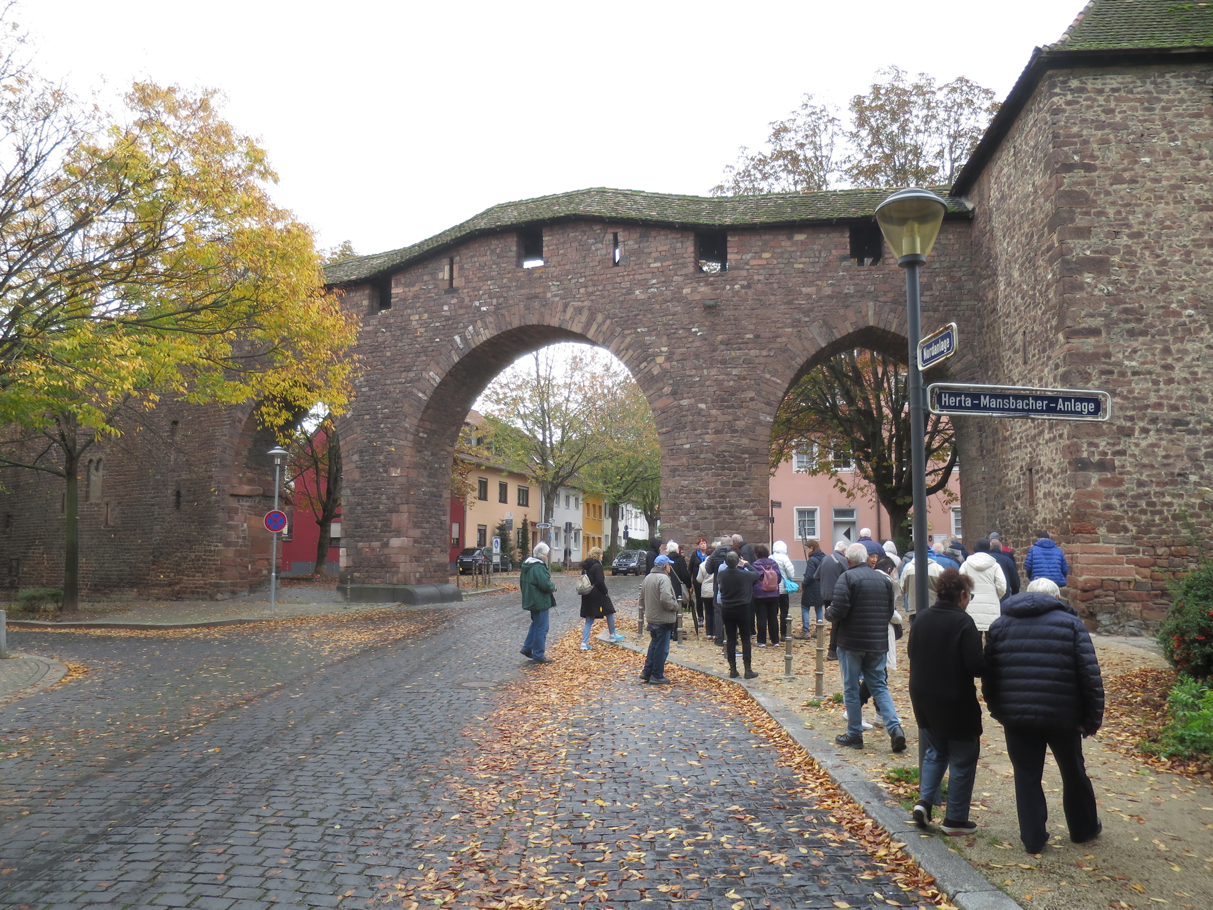 Raschi-Tor mit Touristen, Worms